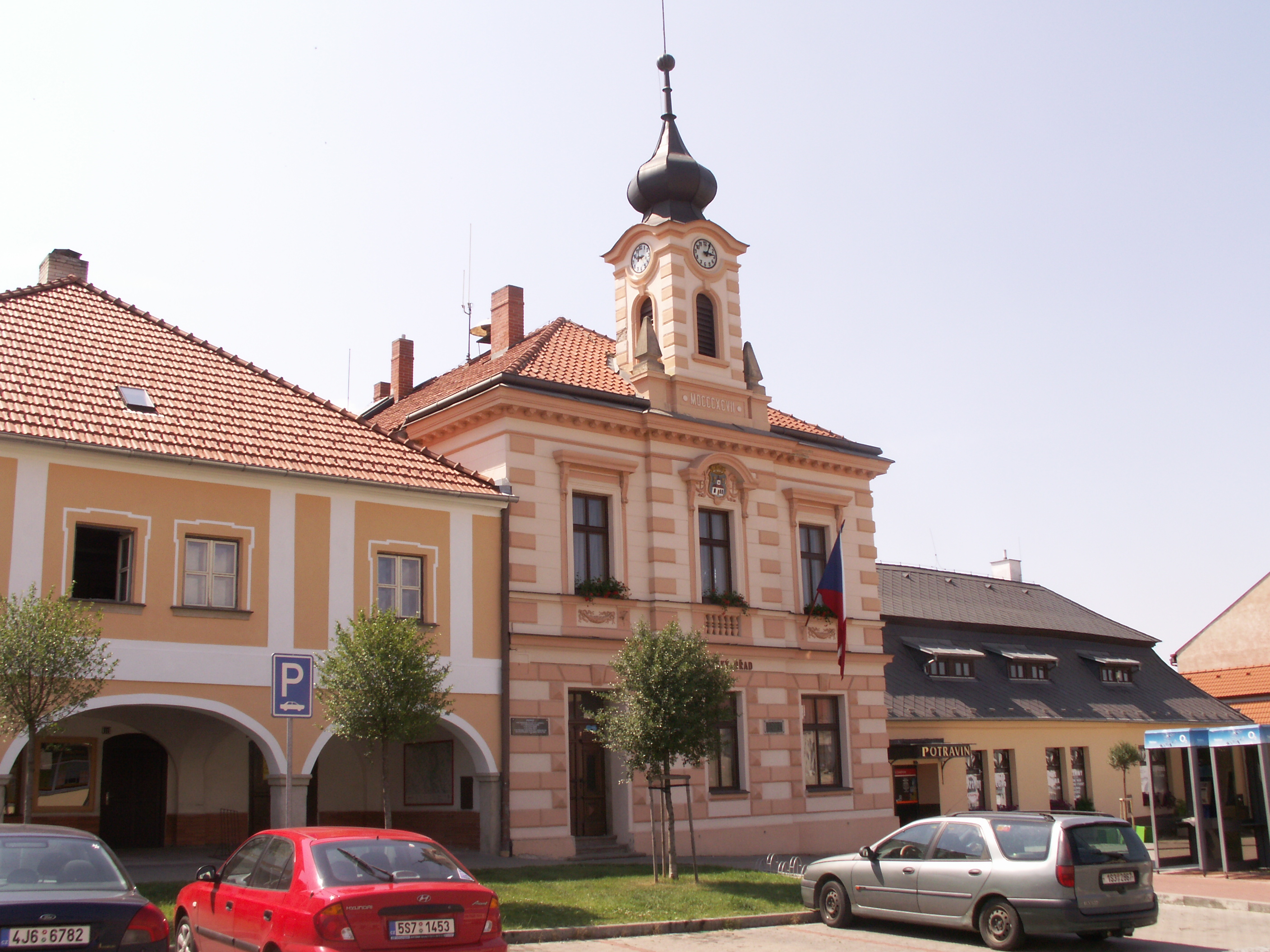 Radnice, nám. T. G. Masaryka 110, Golčův Jeníkov